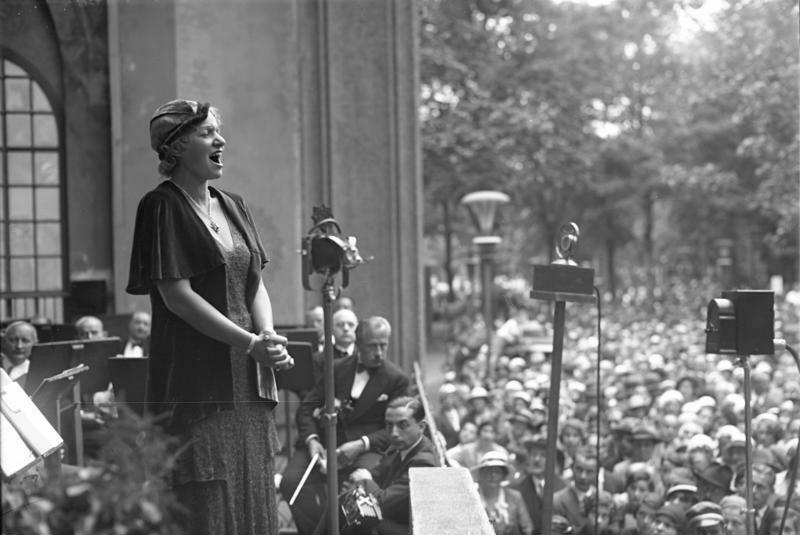 Gitta Alpar und Richard Tauber singen auf einem Wohltätigkeits-Matiné für die Künstleraltershilfe im Berliner Zoo ! Gitta Alpar die berühmte deutsche Sängerin, singt für alte und erwerbslose Künstler.